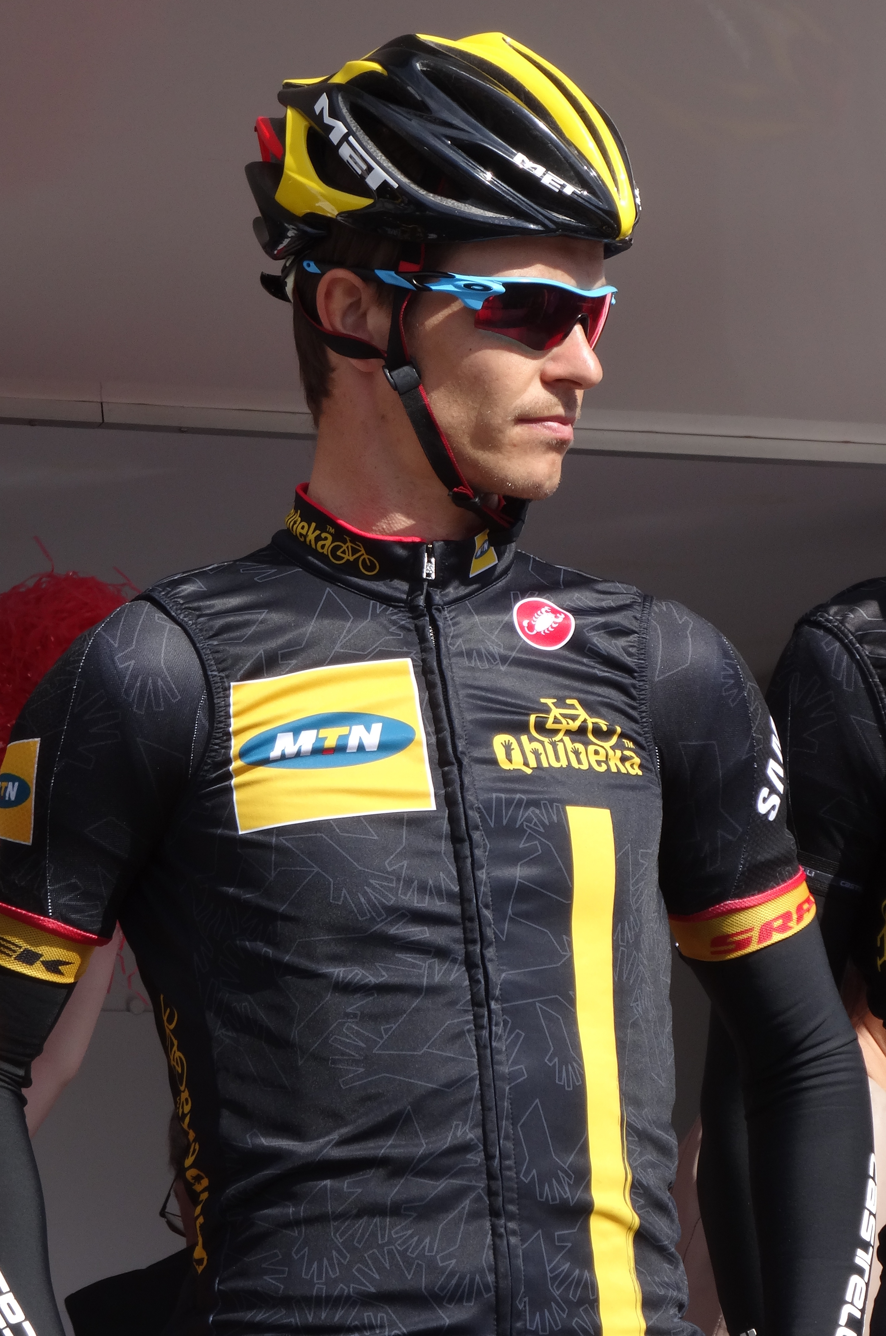 Reportage réalisé le jeudi 17 avril à l'occasion du départ et de l'arrivée du Grand Prix de Denain 2014 à Denain, Nord, Nord-Pas-de-Calais, France.